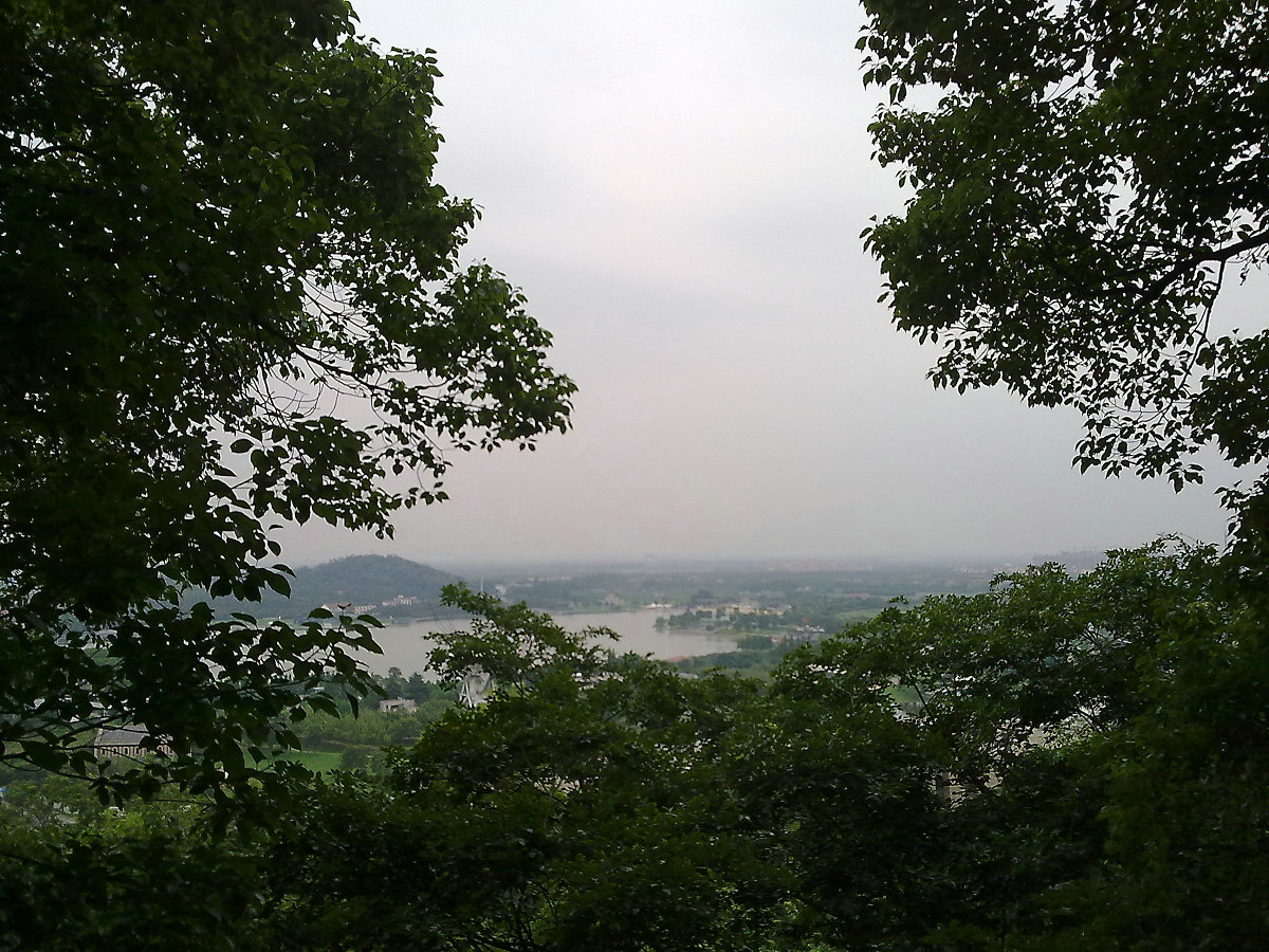 东佘山远望